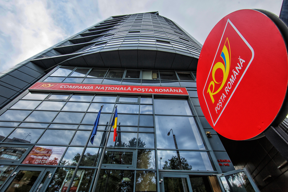 Poşta Română - Sediul central din Bucureşti